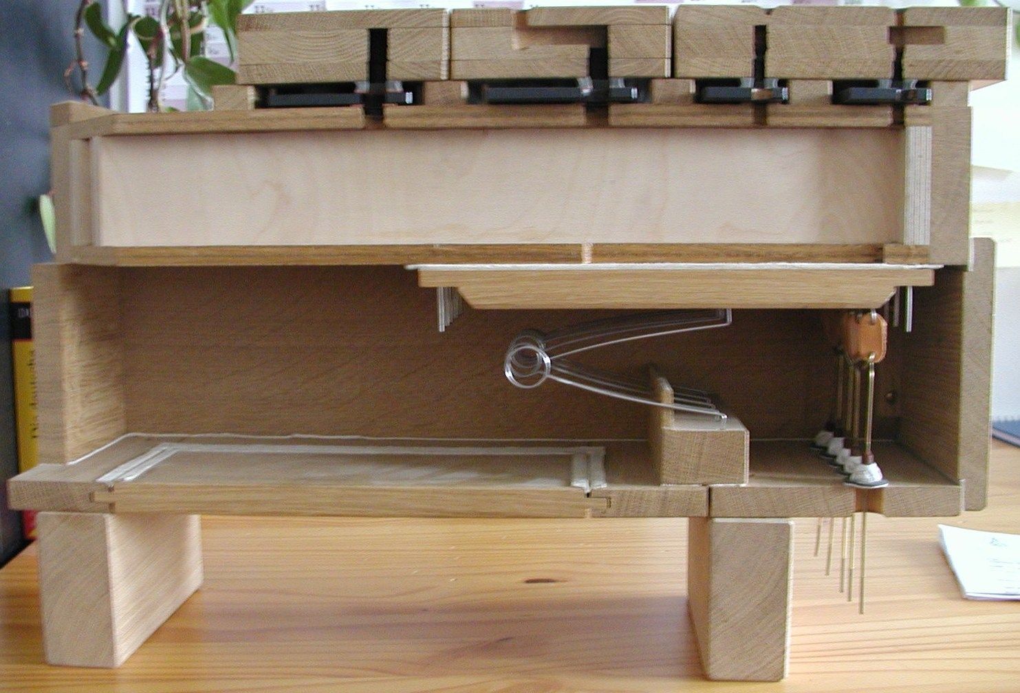 Aufriss einer Schleiflade (Orgel)